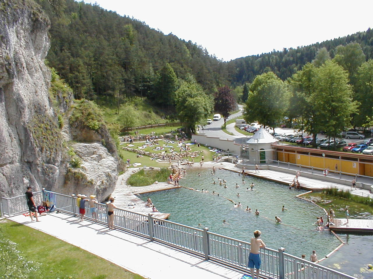 Bick von oben auf das Pottensteiner Felsenbad